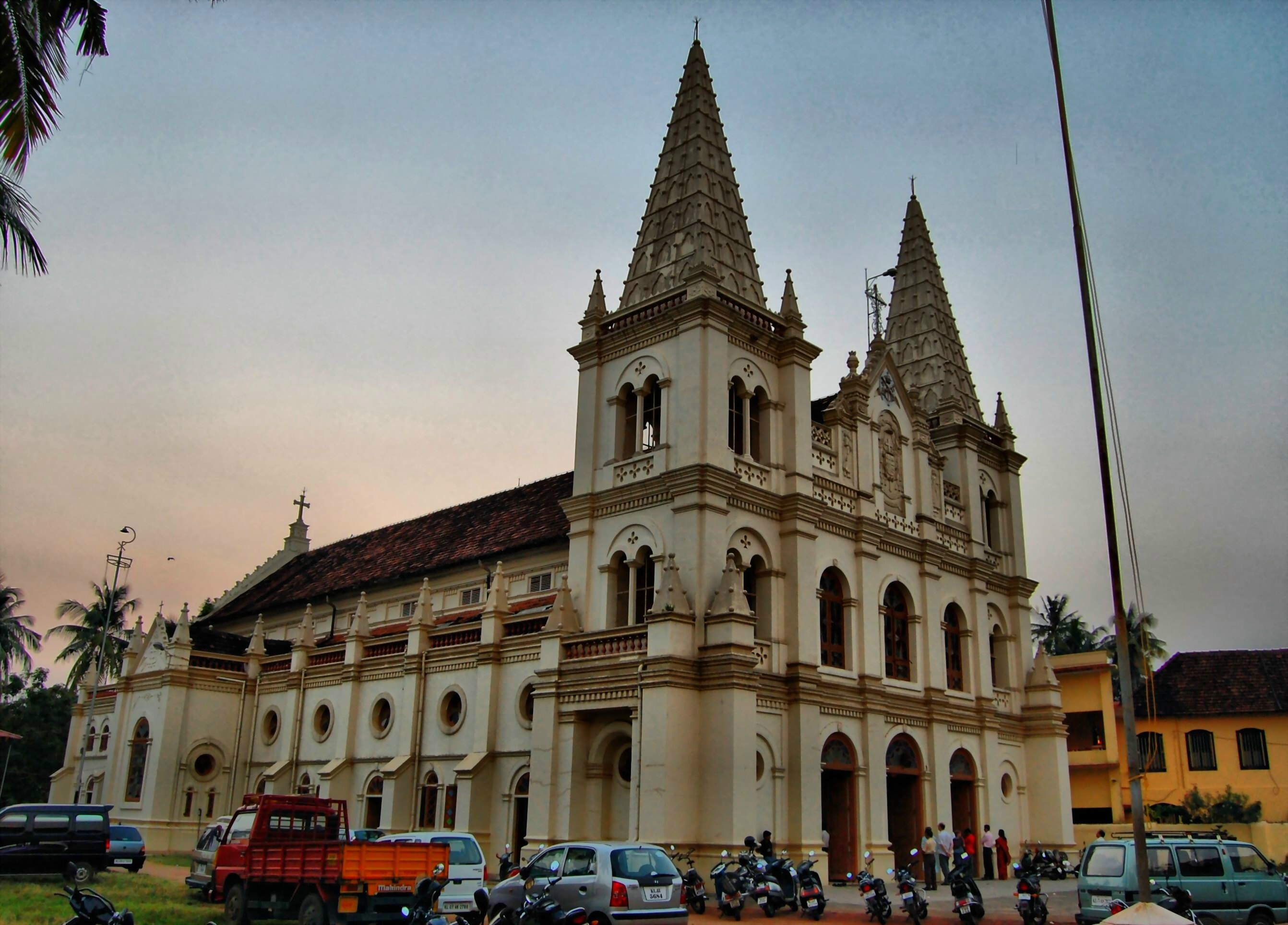 santacruz bascillica of fort kochi kerala